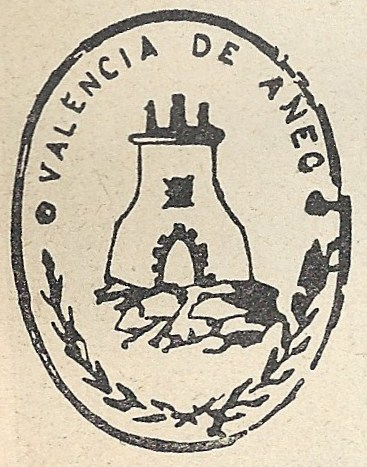 Segell antic de l'ajuntament de València d'Àneu (Pallars Sobirà)